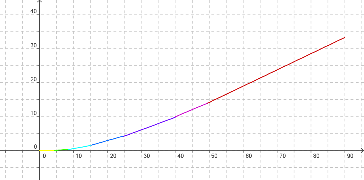 Courbe représentant l'imposition en fonction du revenu imposable (en millier d'euros) pour une personne seule en 2006, en France. Sans tenir compte des réduction d'impôts. Image personnelle créée avec geogebra.